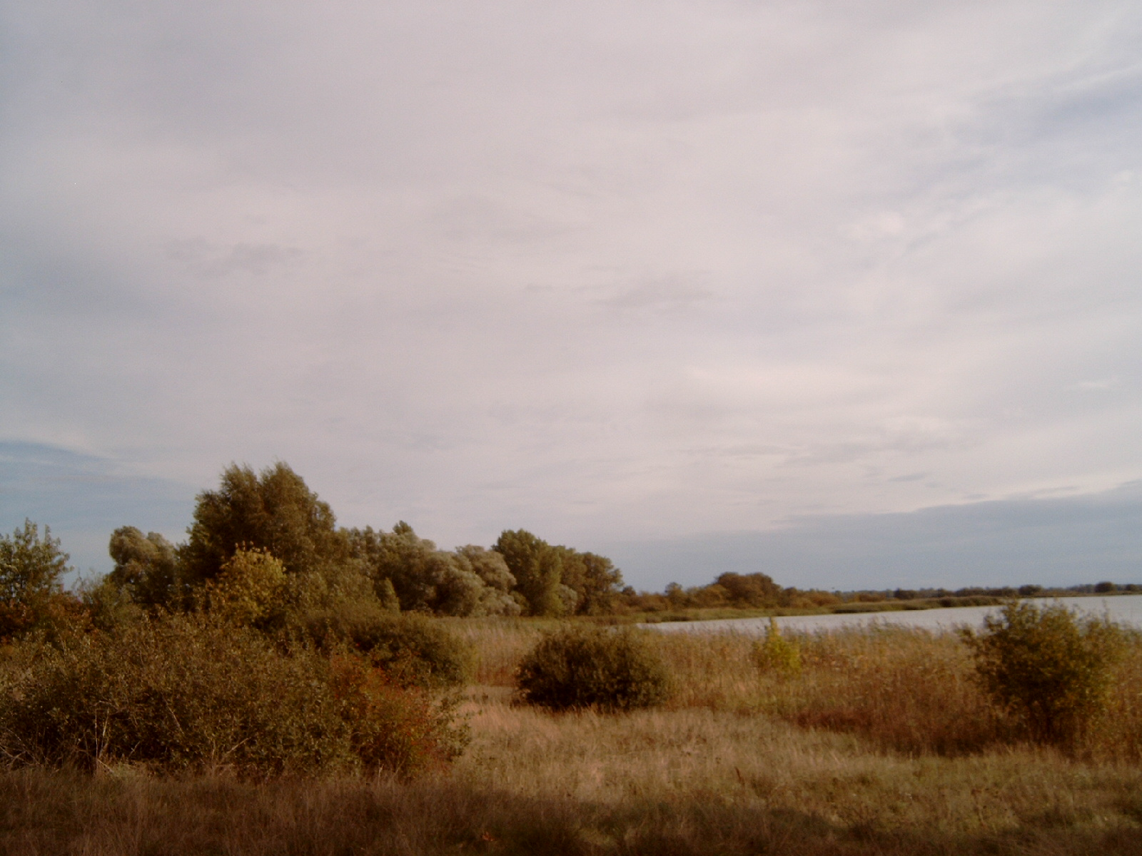 Die Halbinsel Wusterau von Südosten gesehen.